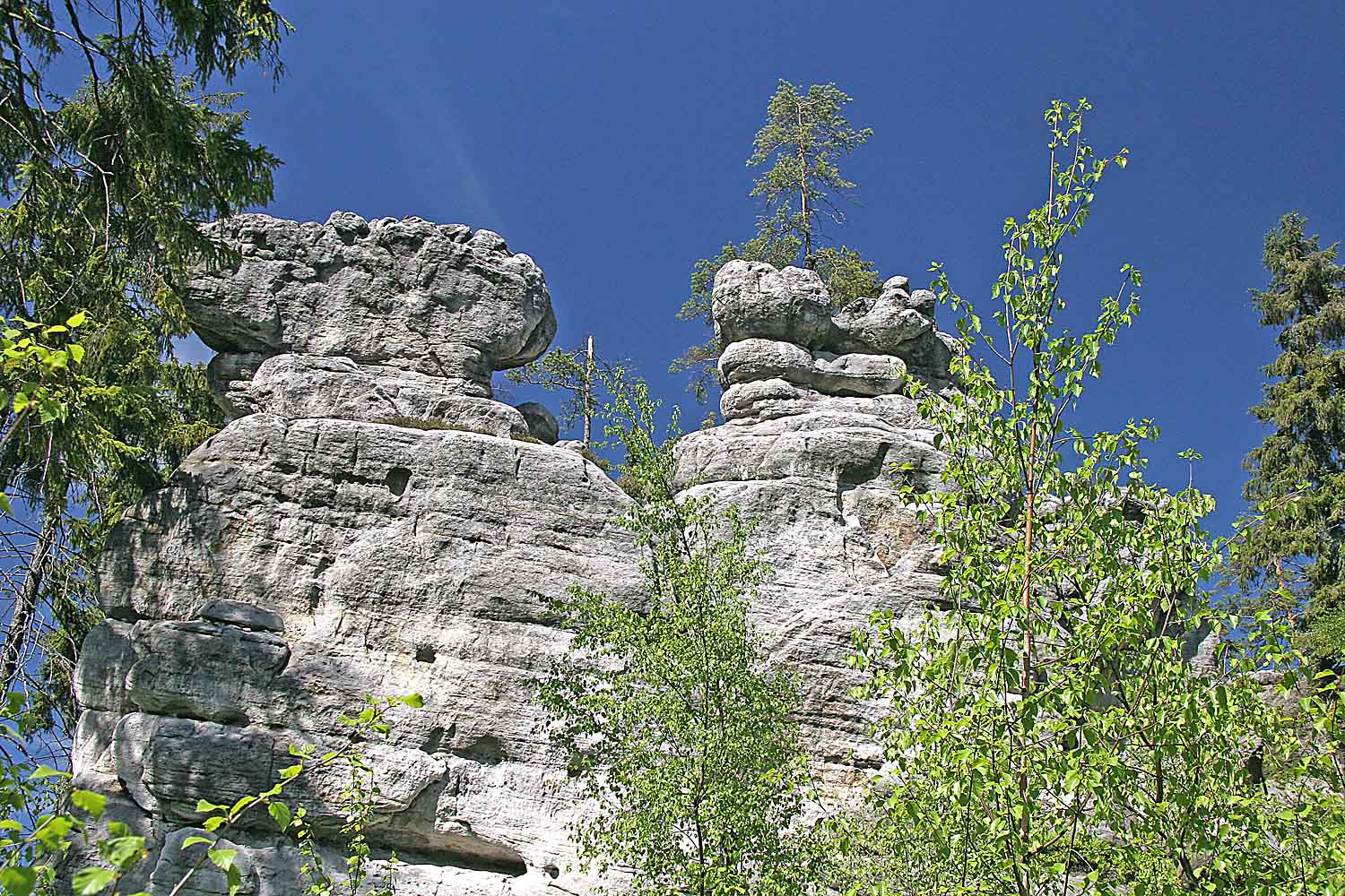 Skalní městno na konci hřebene Bialych Skal ve Stolových horách v Polsku autor:Zp